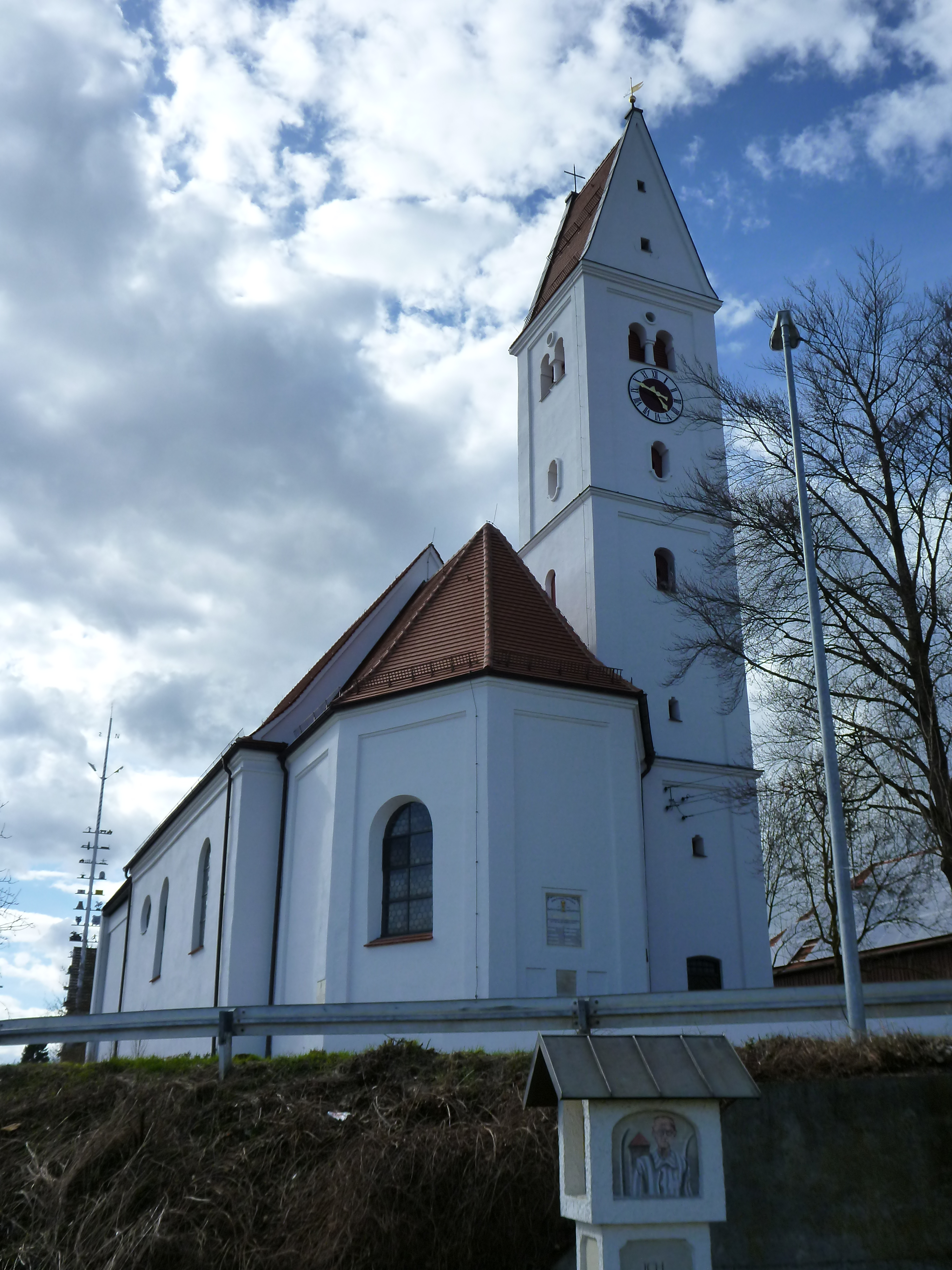 Katholische Pfarrkirche St. Georg; Langhaus 1609, Chor und Turm 1612 von Elias Holl, 1641 erneuert, 1761 innen umgestaltet; Außenansicht